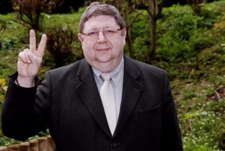 Le député bruxellois et Secrétaire général du Front National, Patrick Sessler.